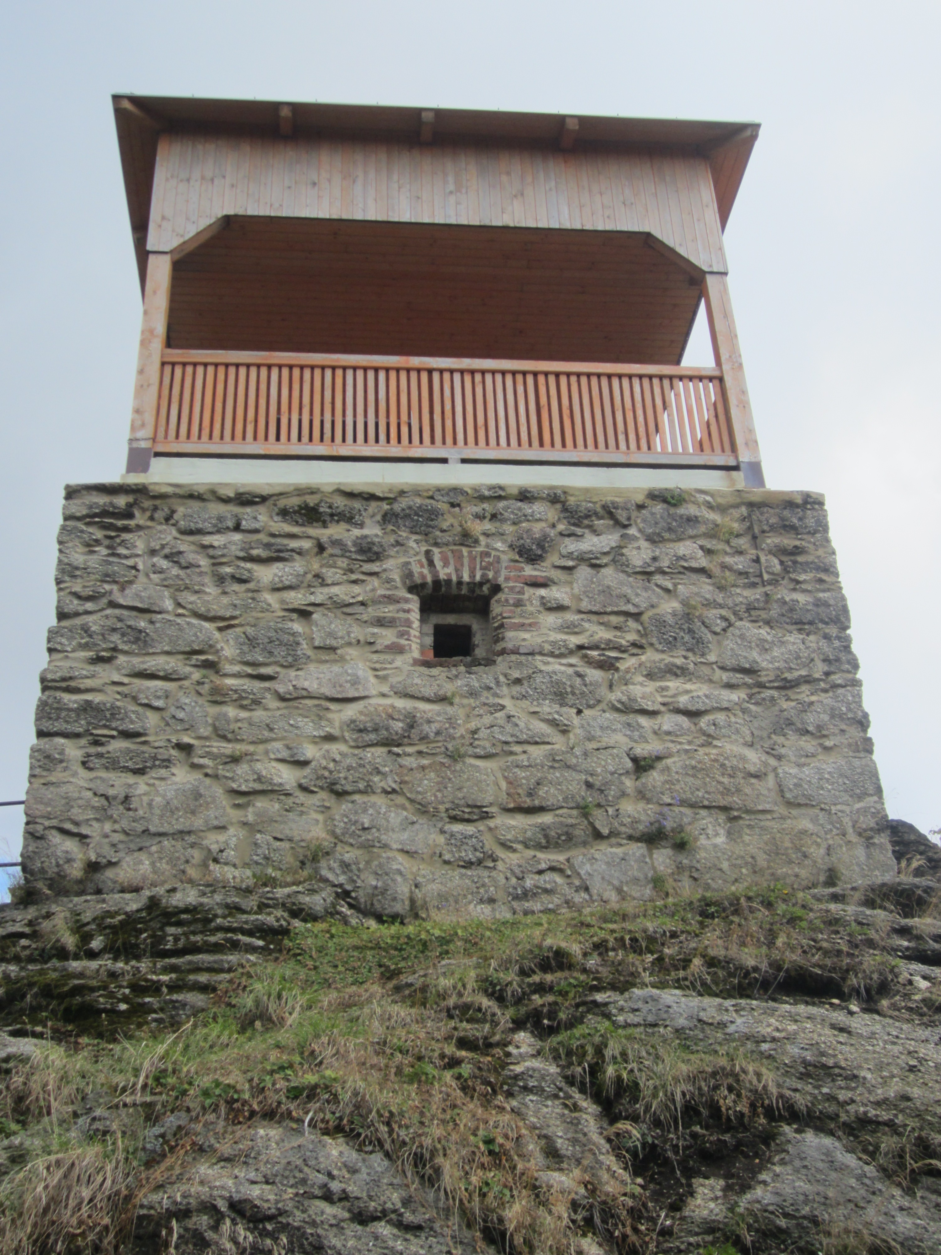 Rozhledna Jeřabina